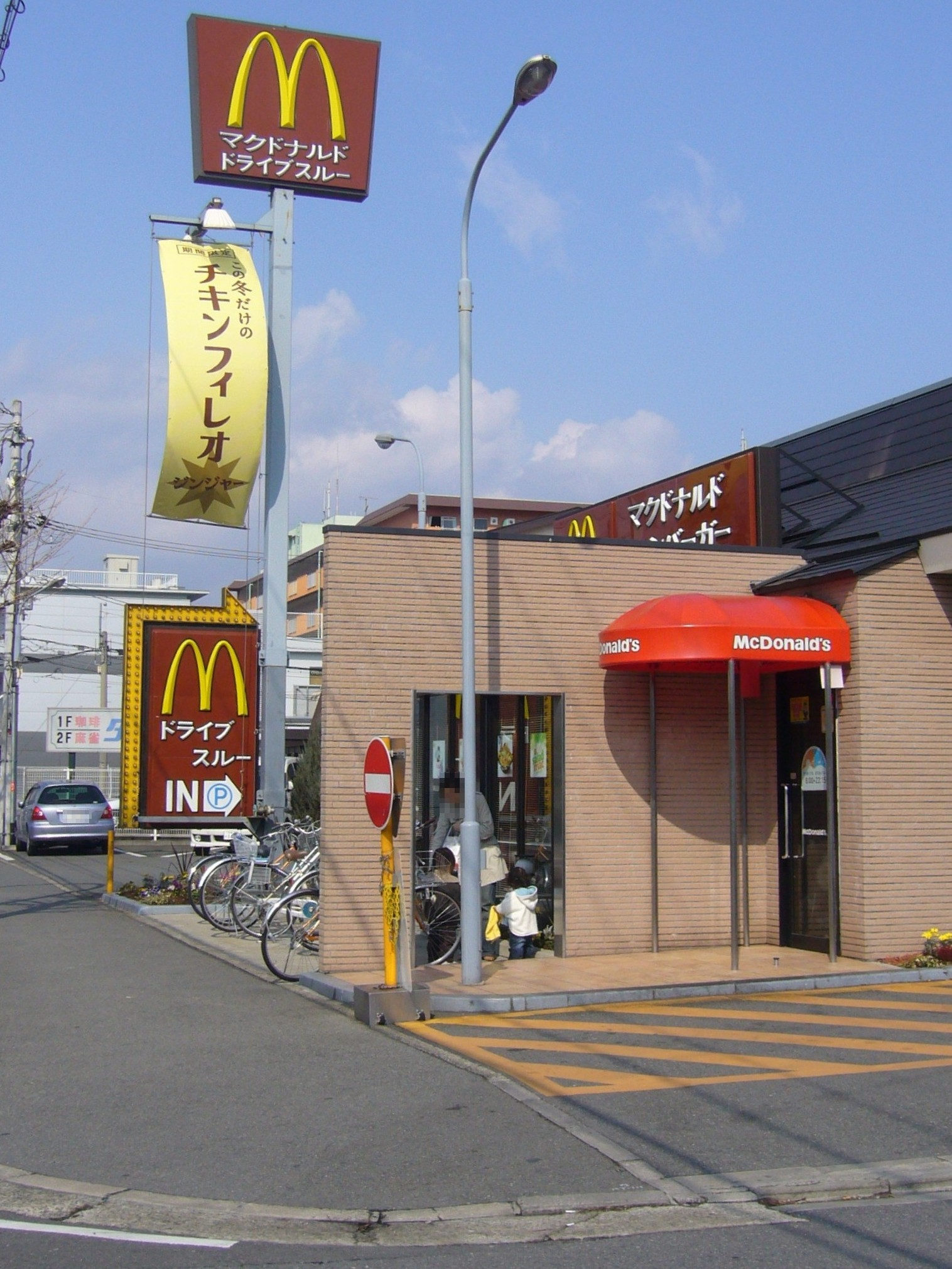 日本マクドナルドの京都吉祥院支店。よくある真っ赤な看板ではなく、エビ茶色の看板。京都市市街地景観整備条例に基づく措置で、他にもすき家やモスバーガーなども同様の色である。しかしなぜかテントは真っ赤である。